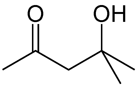 Diacetonalkohol